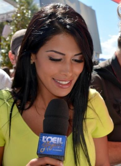 Ayem Nour au festival de Cannes